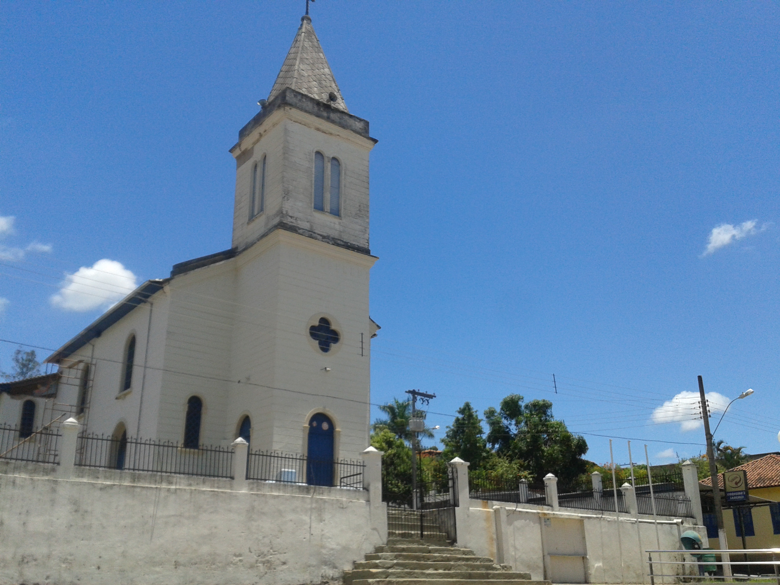 Vista frontal da Paróquia N.S. de Nazaré em Antônio Dias-MG